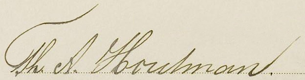 Подпись Тео Хаутман